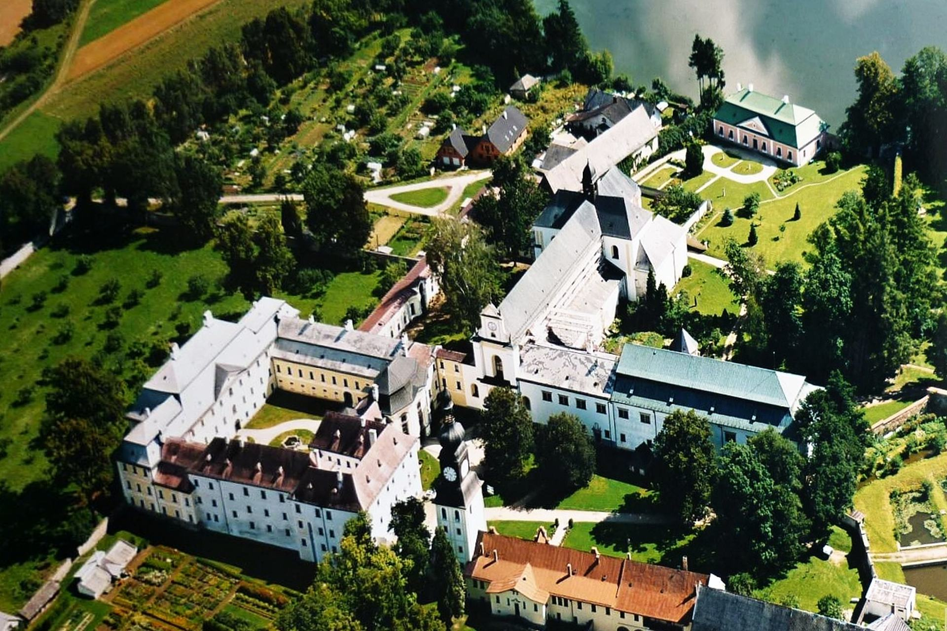 Zámek ve Žďáru nad Sázavou